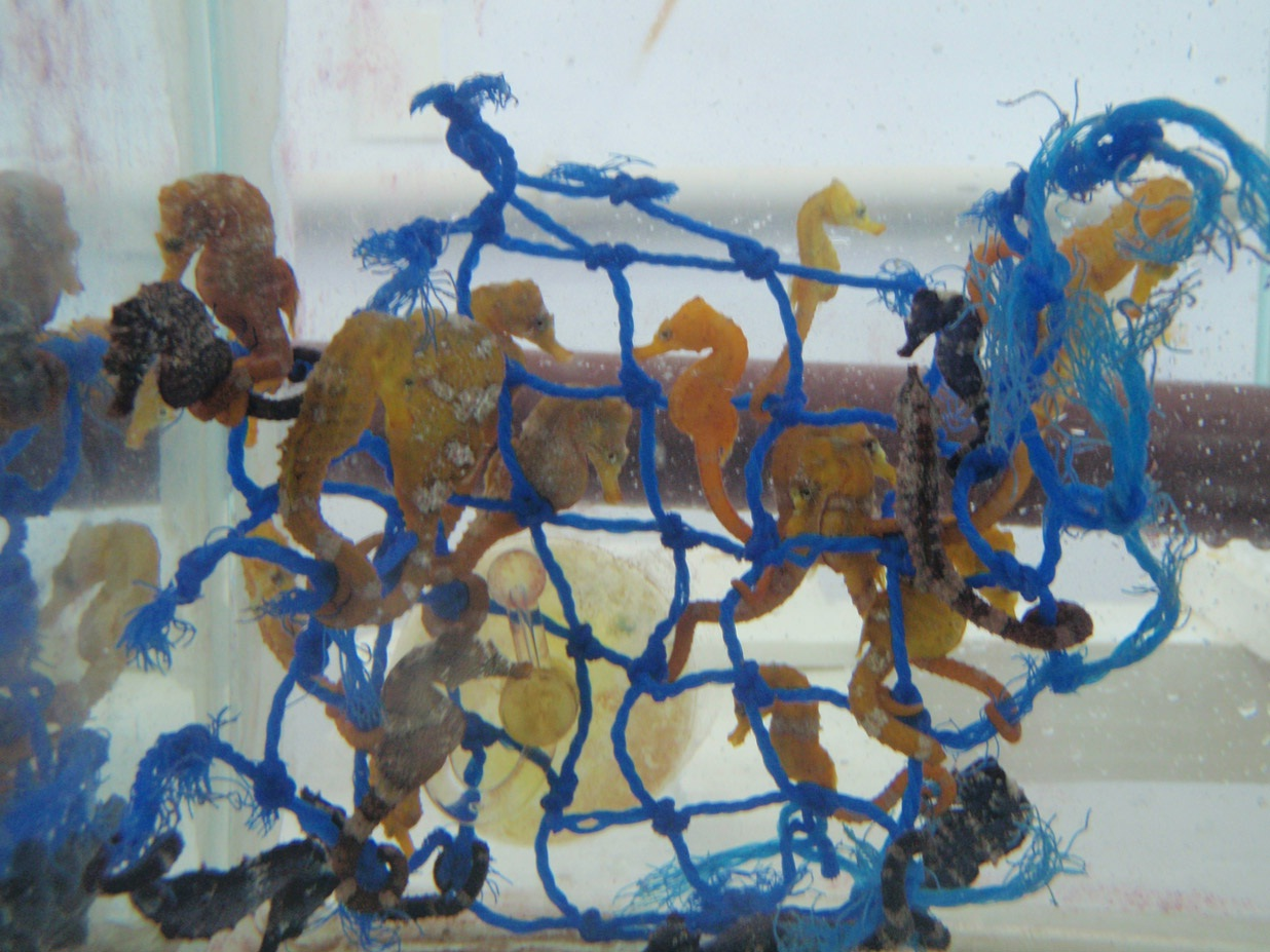 variabilidad de colores de H. patagonicus